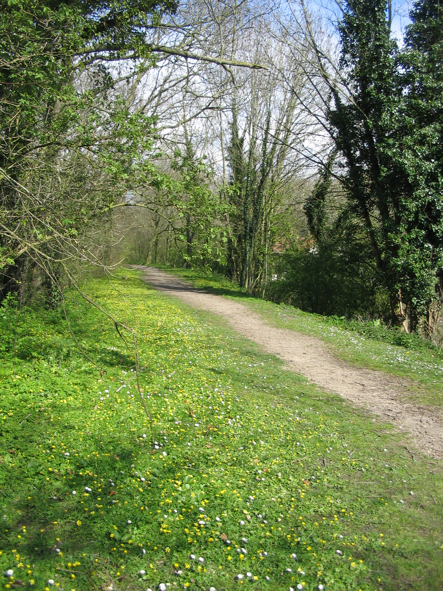 L'ancienne voie de chemin de fer, Wailly-Beaucamp, France